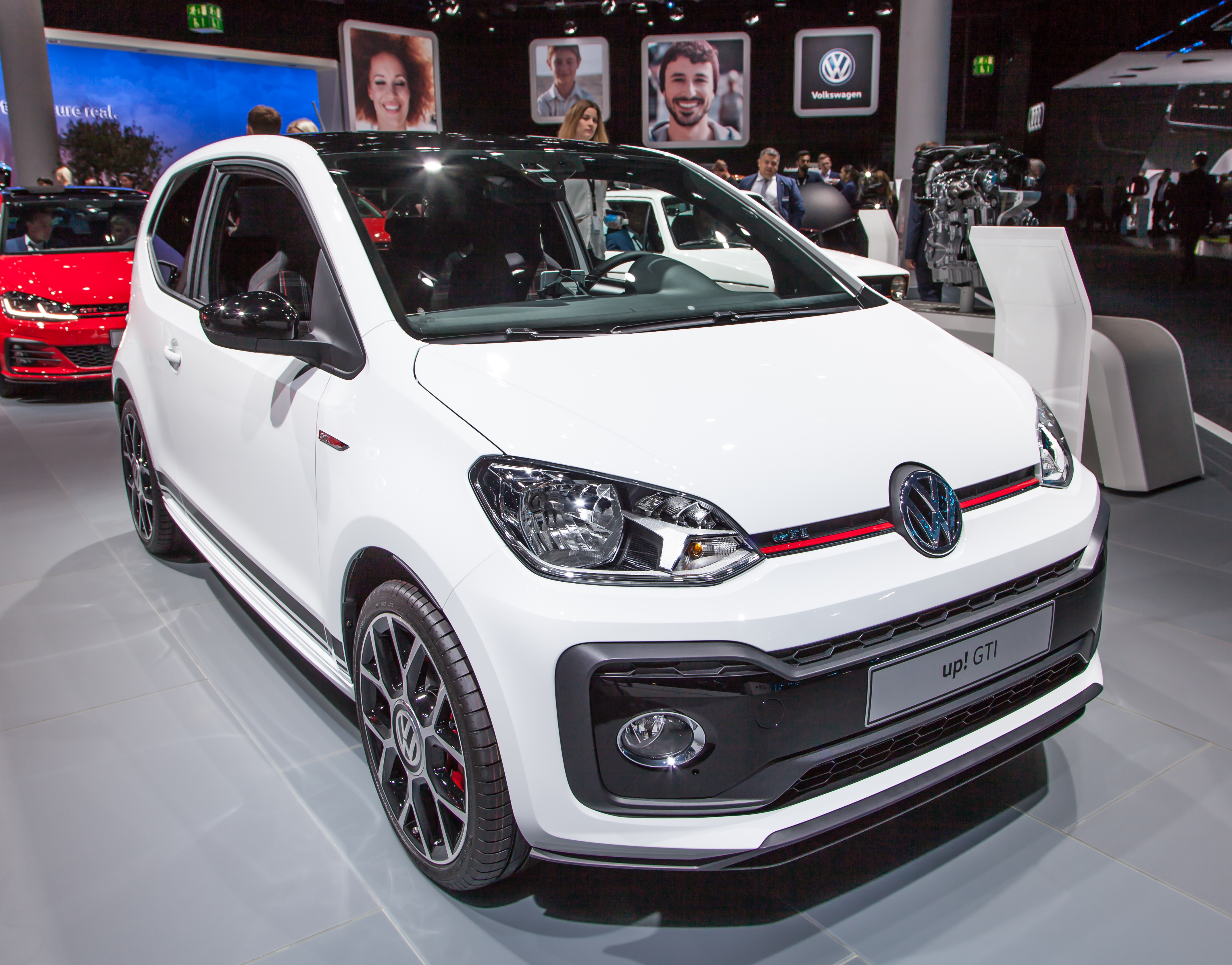 VW Up GTI